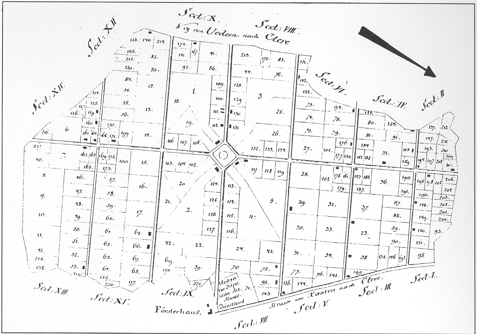 Grundriss der Kolonie Louisendorf - Map of Louisendorf, Germany